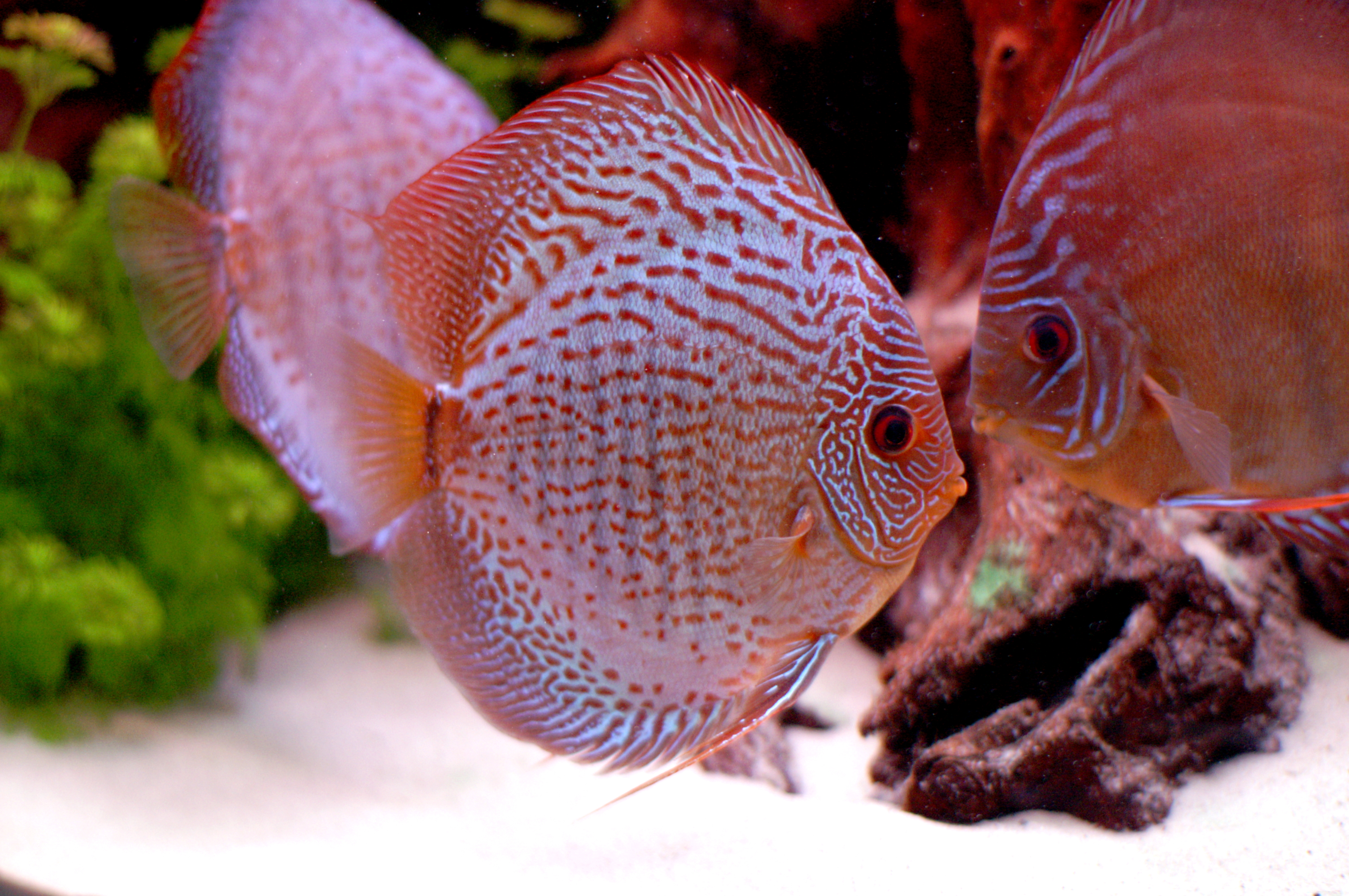 Zelfgemaakte foto van mijn discussen (symphysodon aequifasciatus "Leopard Snakeskin") op de tentoonstelling 2006 van discusclub "De Discusvrienden". Mijn aquarium kreeg de publieksprijs...